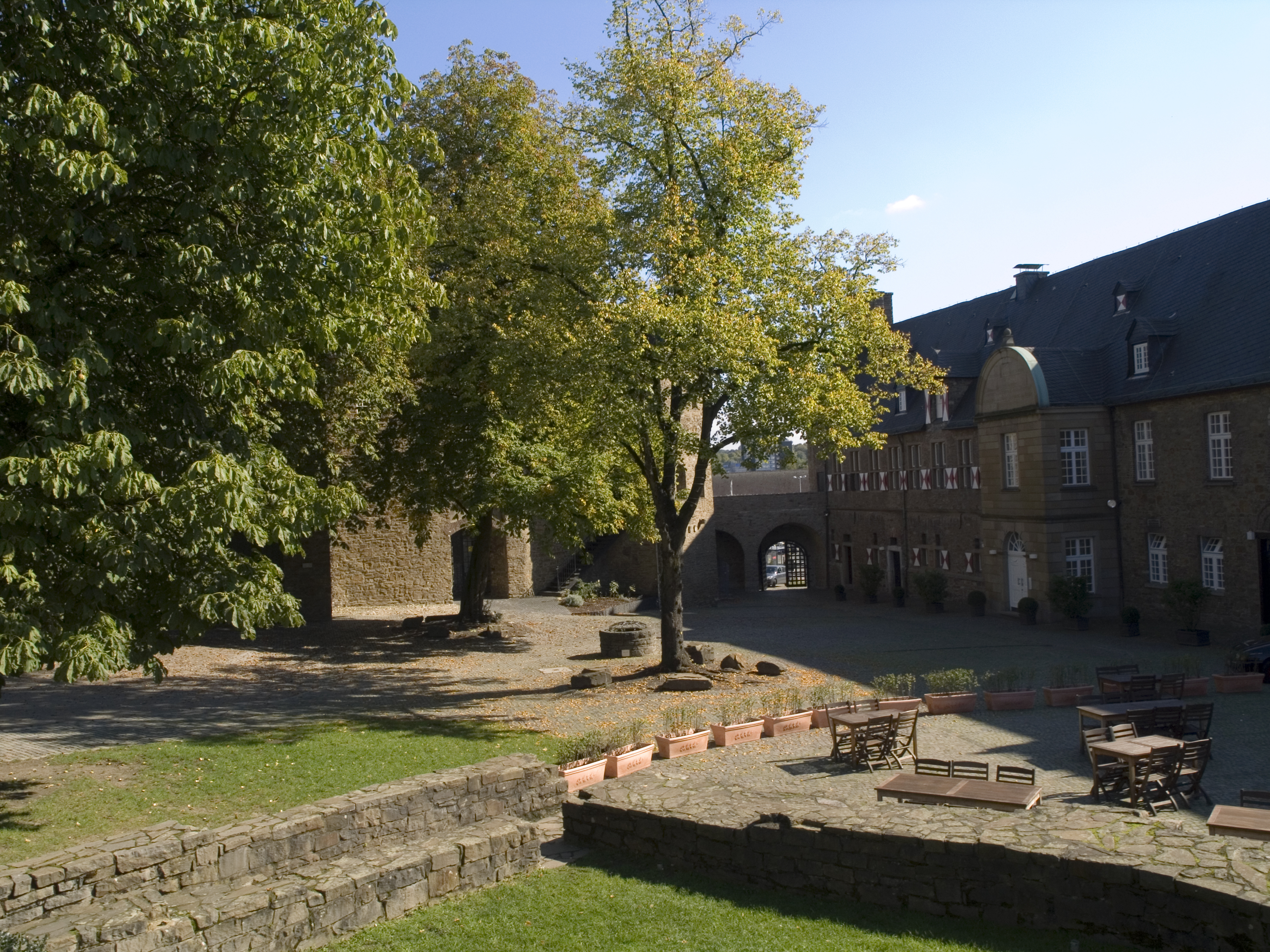 Северный Рейн-Вестфалия, Мюльхайм-на-Руре - замок Бройх